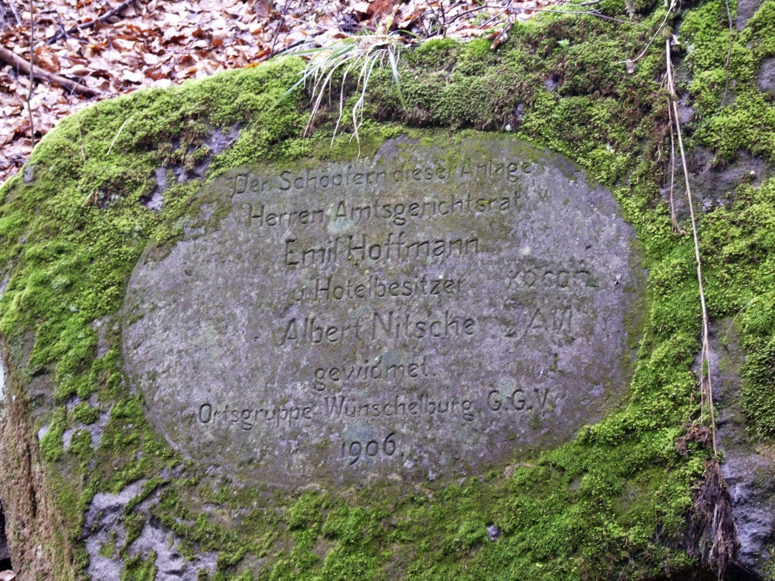 Napis pamiątkowy wykuty w skale przez członków oddziału G.G.V. Wünschelburg (Radków) przy szlaku prowadzącym z Pasterki do Radkowa